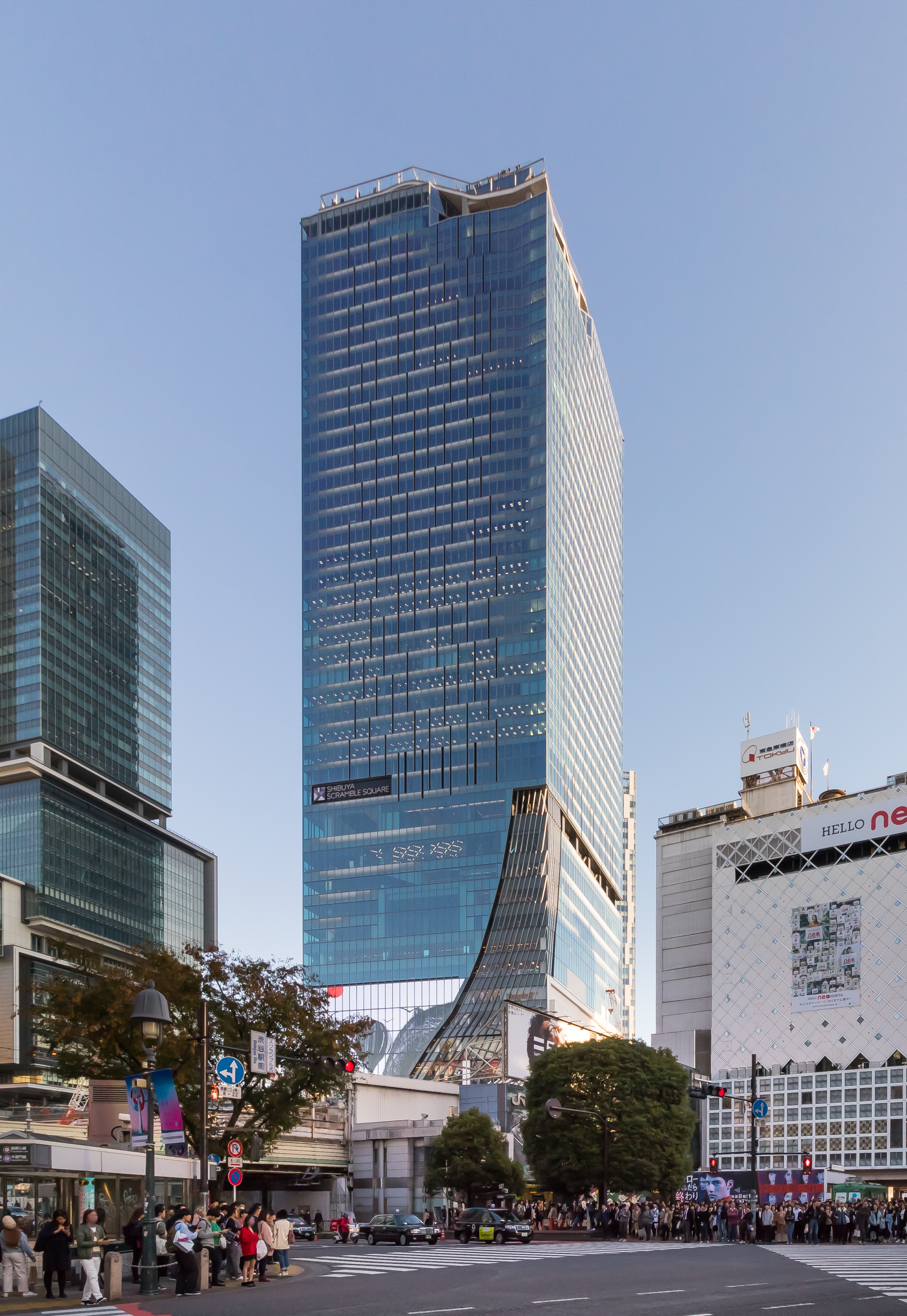 渋谷スクランブルスクエア。渋谷駅前スクランブル交差点より。